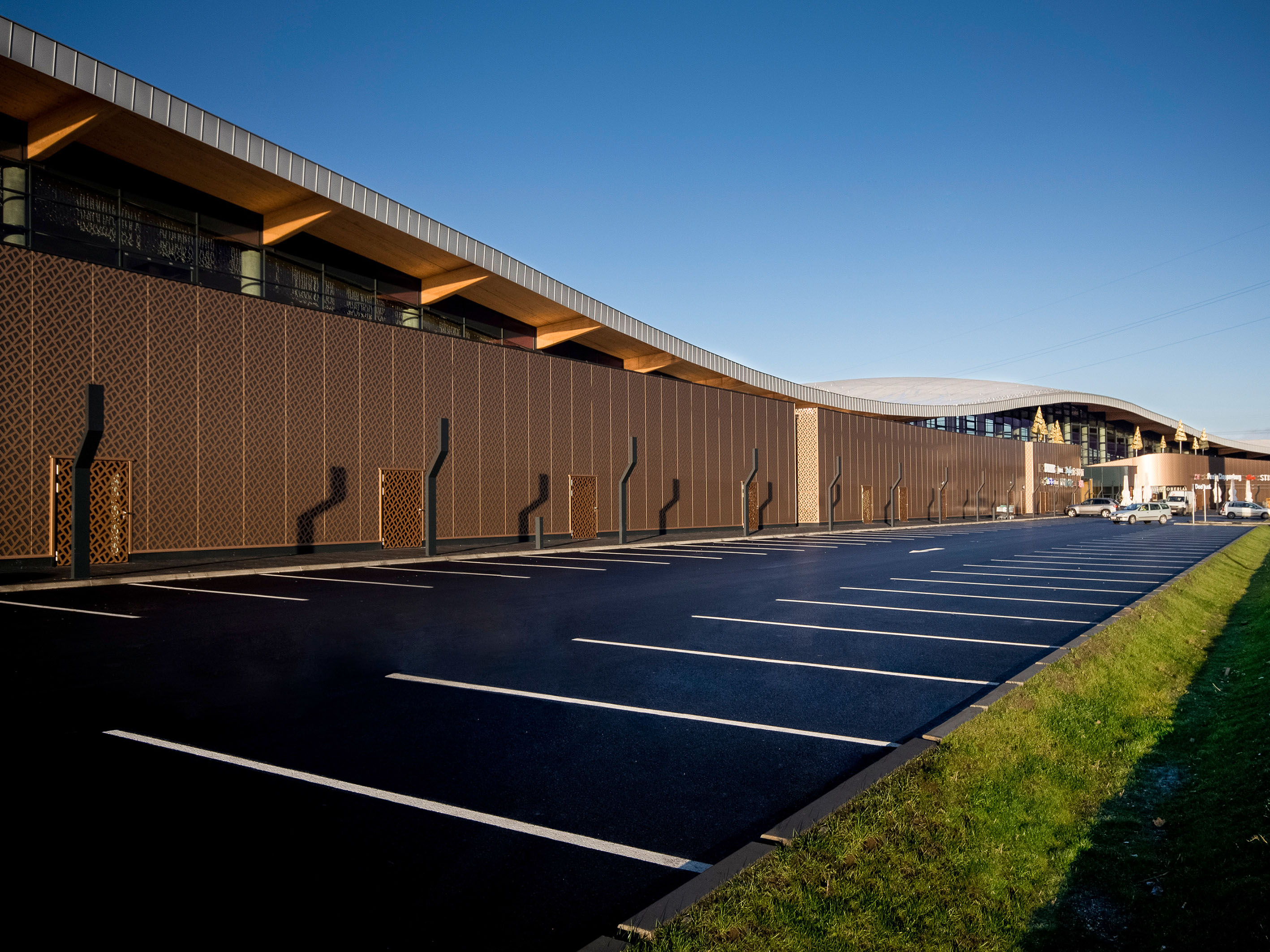 G3 Shopping Resort, Gerasdorf (Österreich)